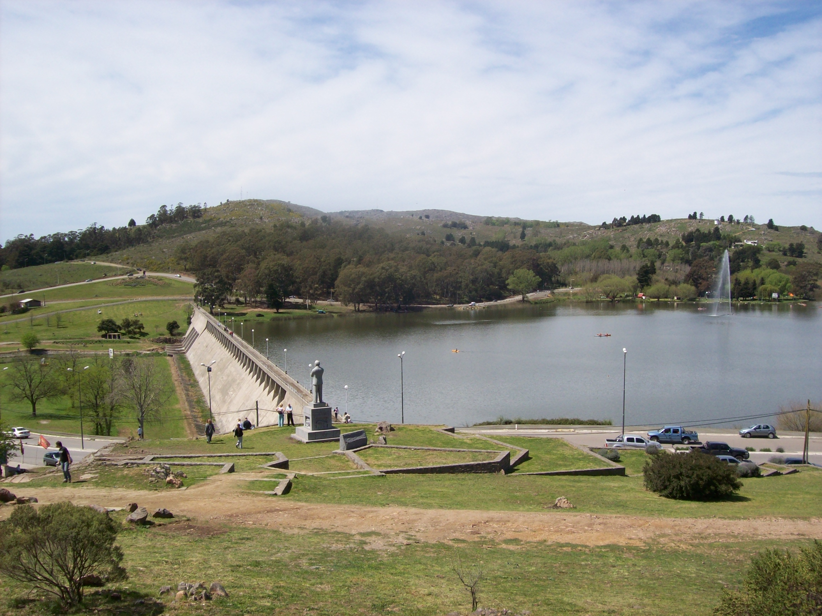 Lago y geiser artificial en Tandil, Provincia de Buenos Aires, Argentina.